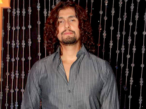 Sonu Nigam at Sonu Nigam and Omi Vaidya at Star Plus 'Chhote Ustaad' launch